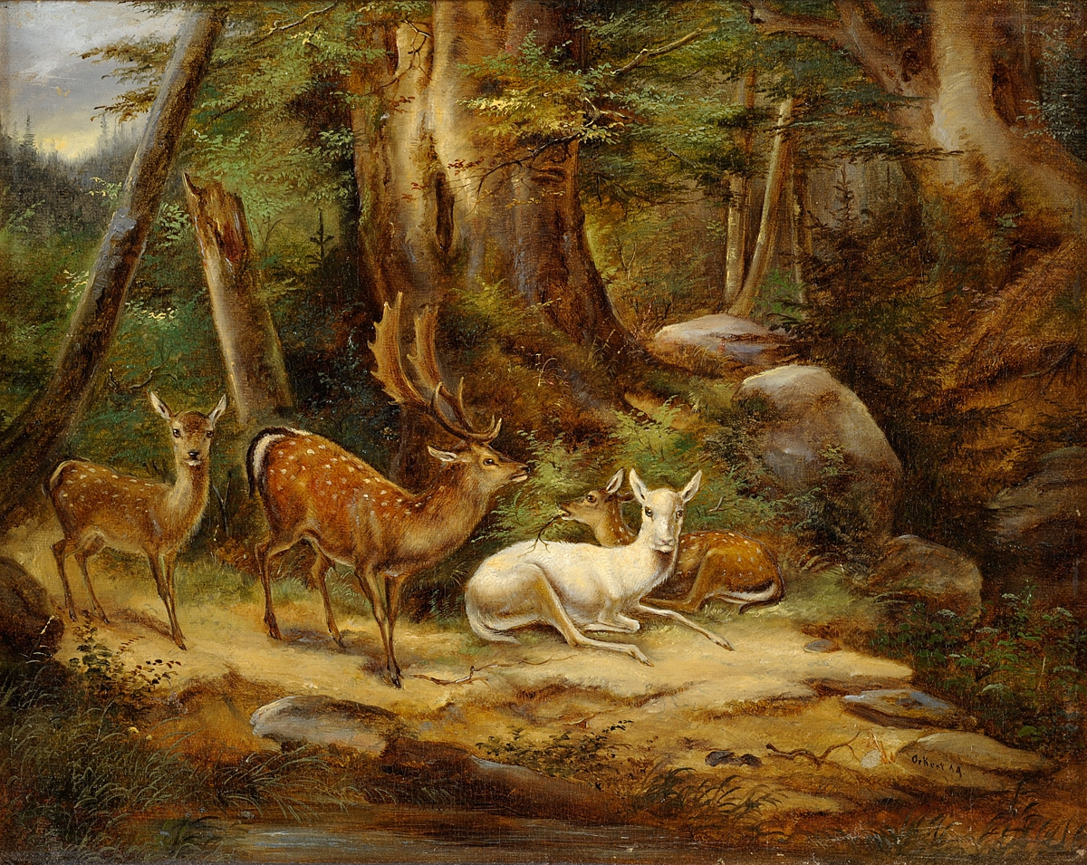 Edelwild. Signiert. Rückseite betitelt. Öl auf Leinwand. 24 x 30 cm.